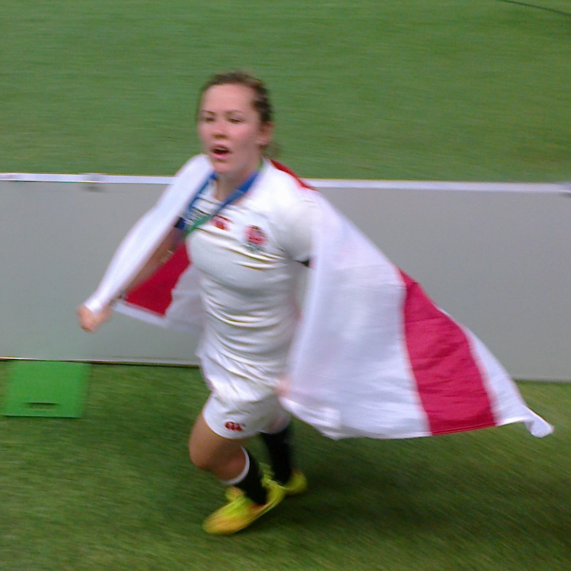 Marlie Packer, joueuse anglaise international de rugby à XV après la finale de Coupe du monde Angleterre-Canada du 17 août 2014 au stade Jean-Bouin